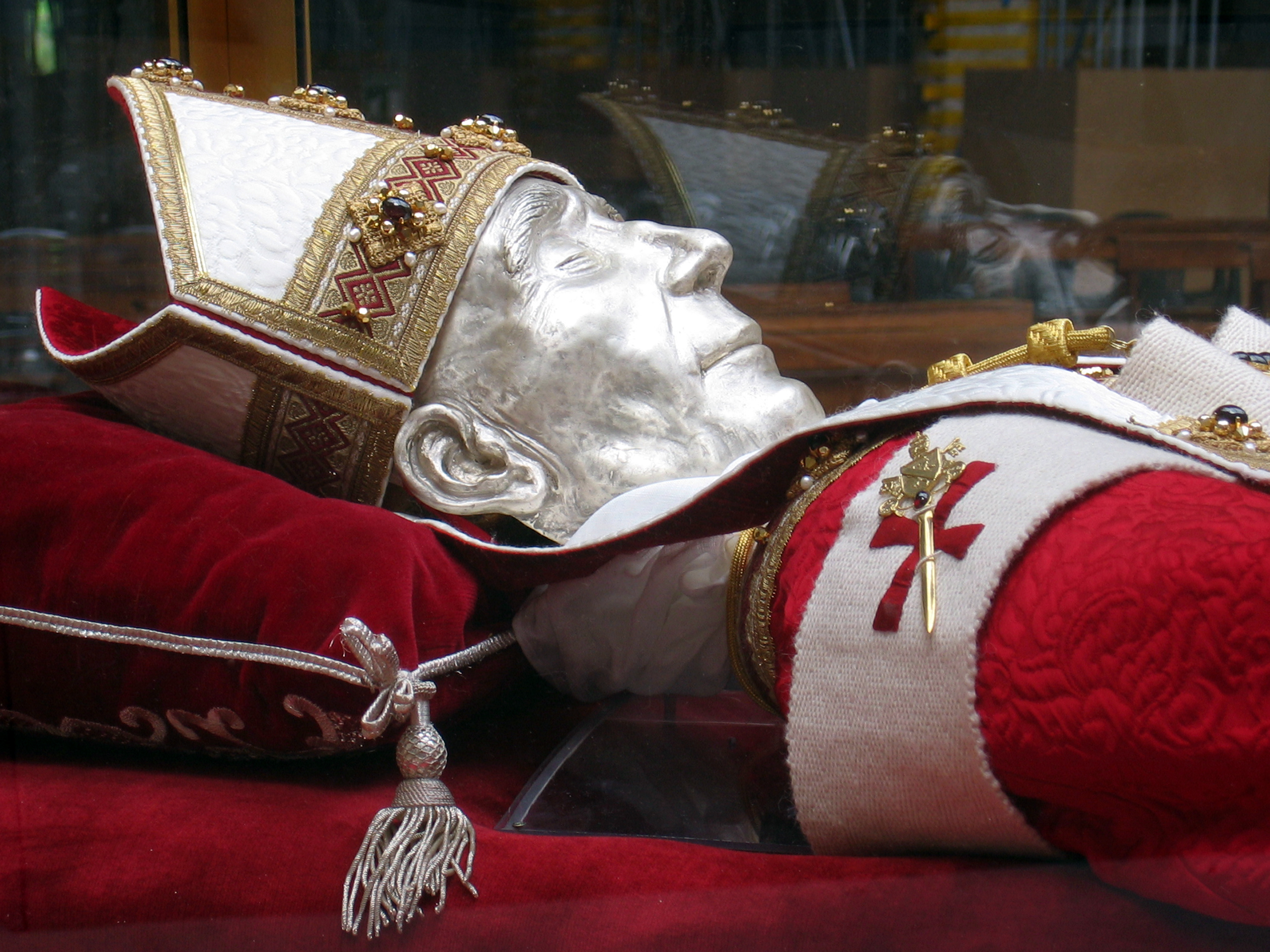 Il corpo di papa Celestino V con i paramenti rinnovati dopo la ricognizione canonica nel VII Centenario della sua canonizzazione (1313-1313). Basilica di S.M. di Collemaggio, L'Aquila.